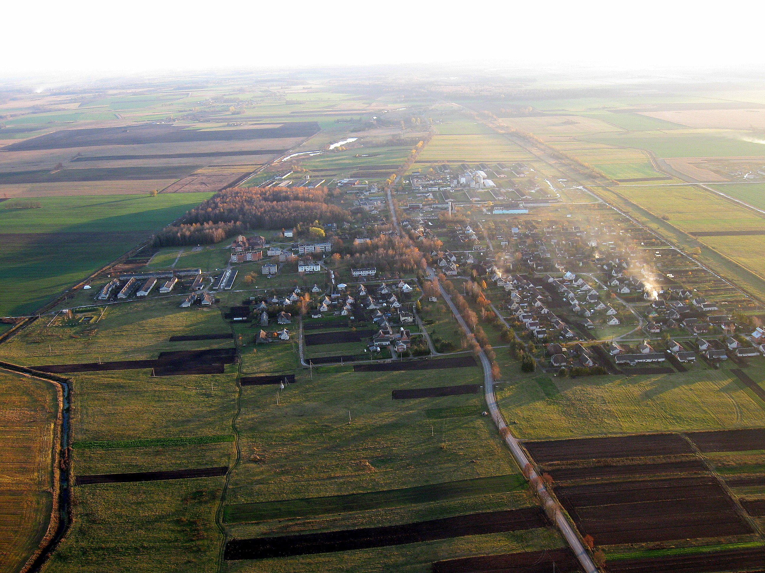 Mikoliškis. Fotografuota 2008-11-02.Autorius as